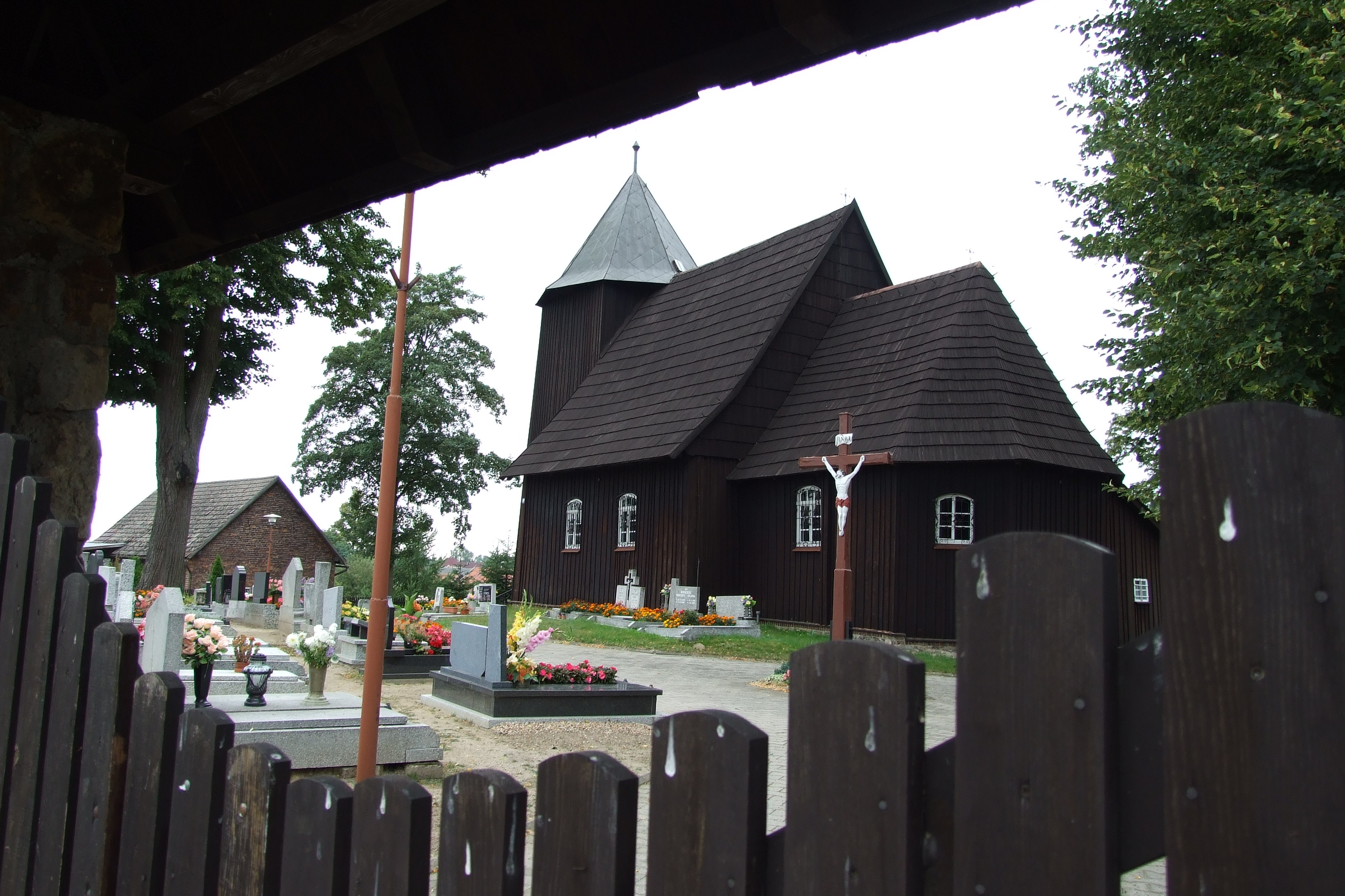 Kościół św. Marii Magdaleny w Boroszowie